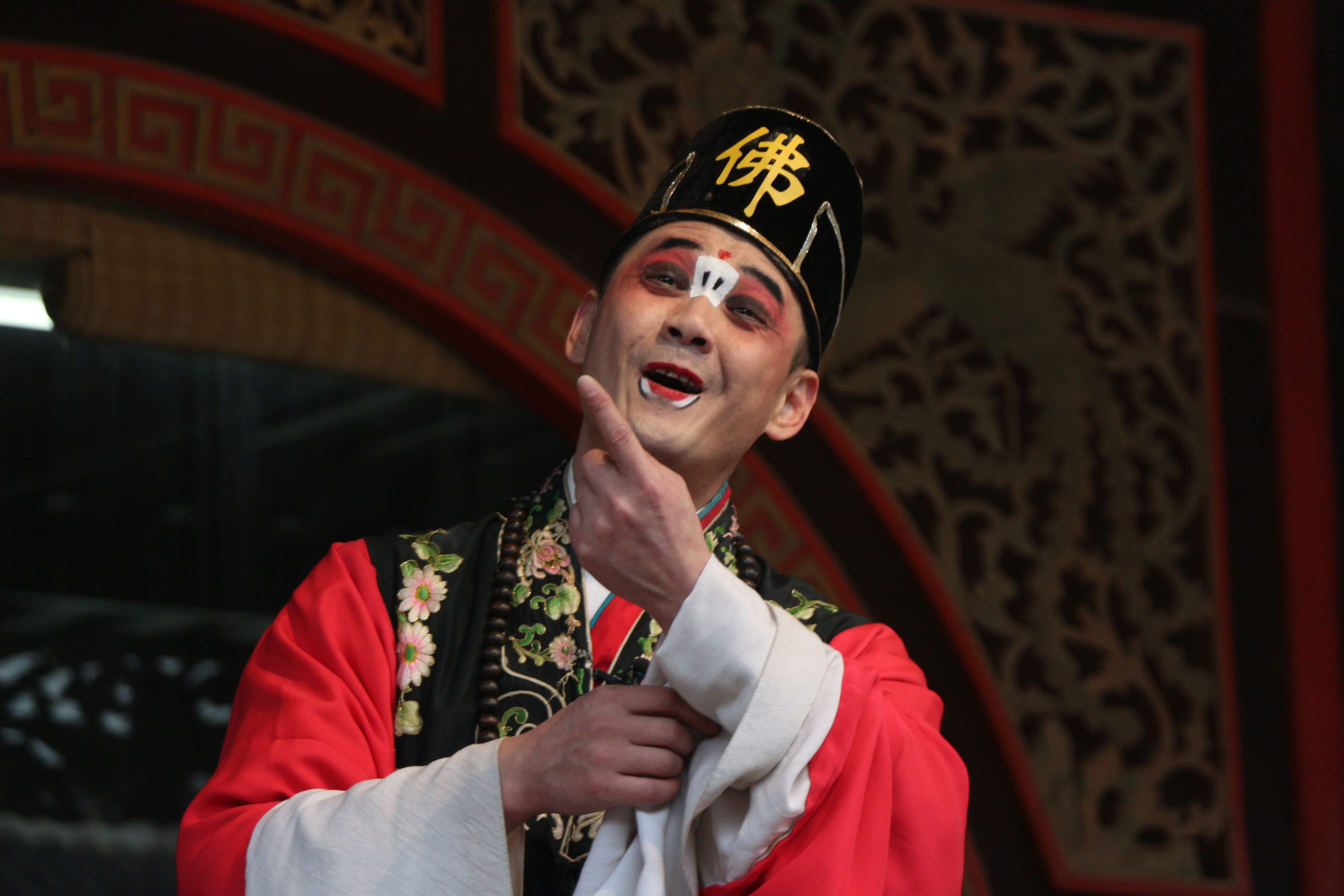 崑曲中的丑角。攝於江蘇周莊古戲臺。